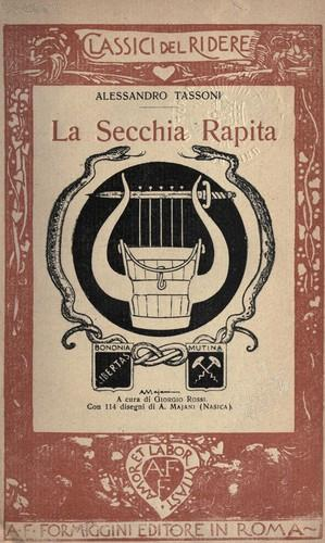 Couverture d'un livre de la collection I Classici del ridere (Les Classiques du rire).